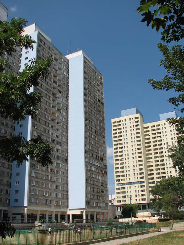 Śródmiejska Dzielnica Mieszkaniowa w Łodzi (tzw. łódzki Manhattan) - zespół największych w Polsce budynków mieszkalnych (megaszaf) wykonanych w technologii tzw. "wielkiej płyty". Widok od strony południowej na dwa najwyższe budynki w Łodzi (każdy po 78 metrów wysokości).